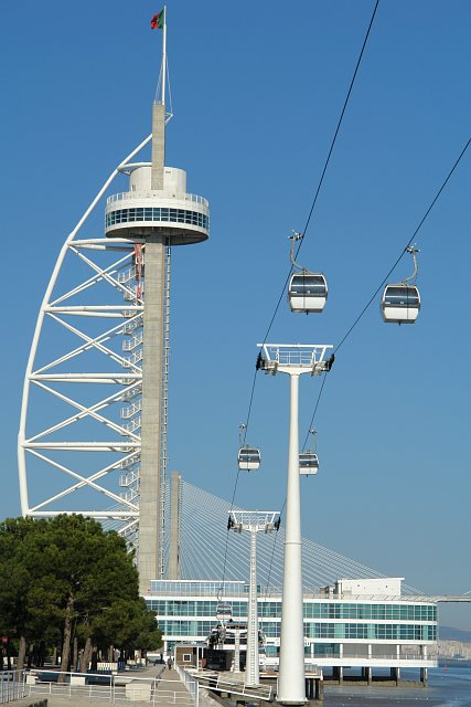 Photographer: Osvaldo Gago